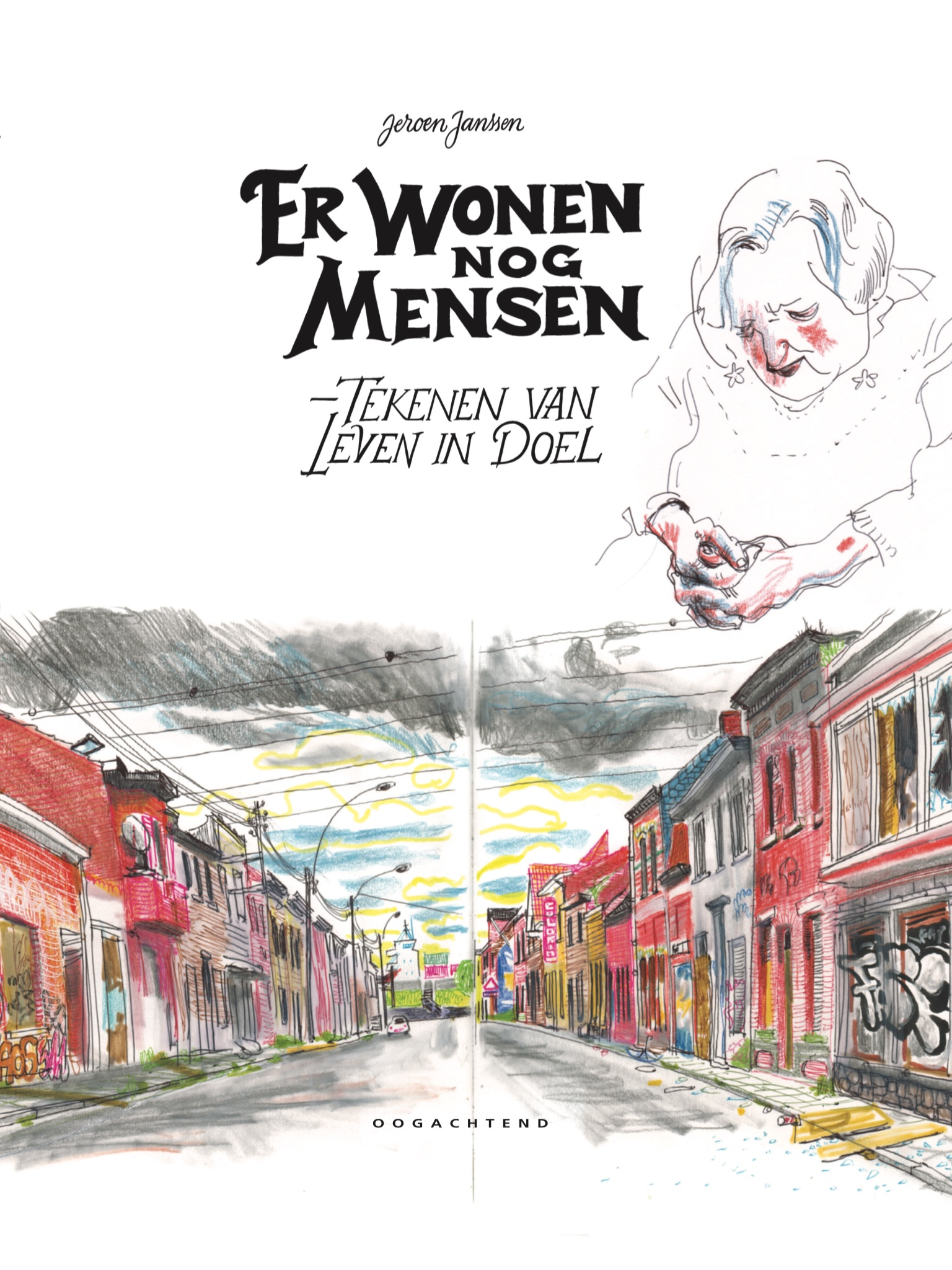 "Er wonen nog mensen / tekenen van leven in Doel" Graphic Novel, Oogachtend 2018